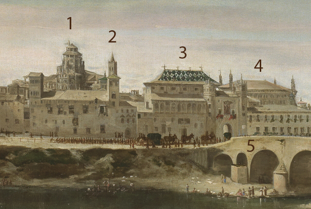 Detalle de Vista de Zaragoza (Óleo de Juan Bautista Martínez del Mazo). 1.- Cimborrio de la Seo, 2.- Torre Mudéjar, 3.- Palacio de la Diputación del Reino, 4.- Lonja, 5.- Puente de piedra.